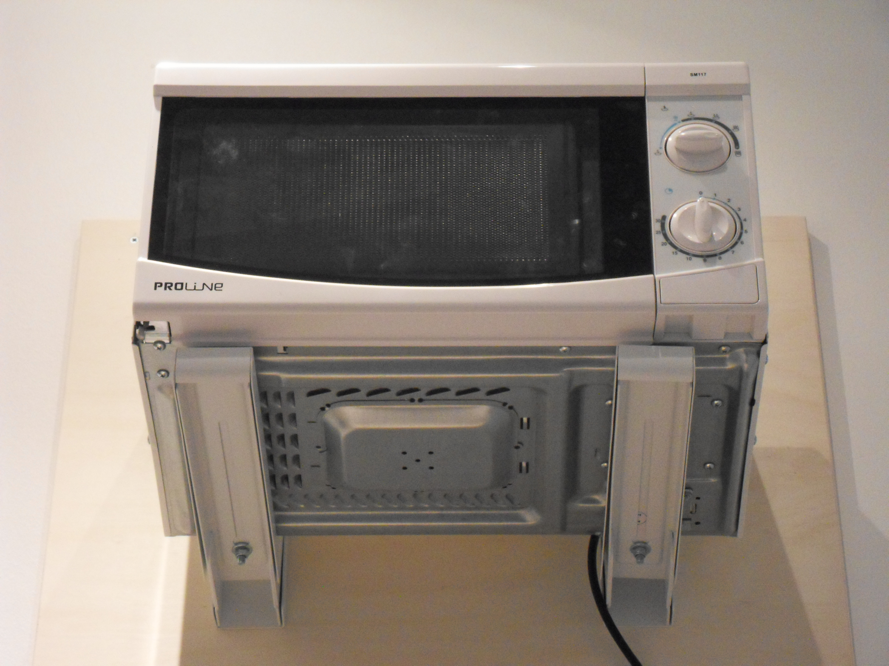 Magnetronbeugels met magnetron.